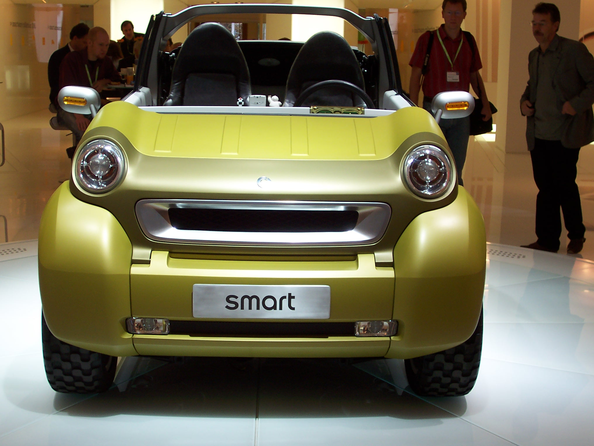 Smart (automobile) - crosstown hybrid (Concept vehicles). Hier: Ohne Windschutzscheibe! Diese liegt unter der "Motorhaube".